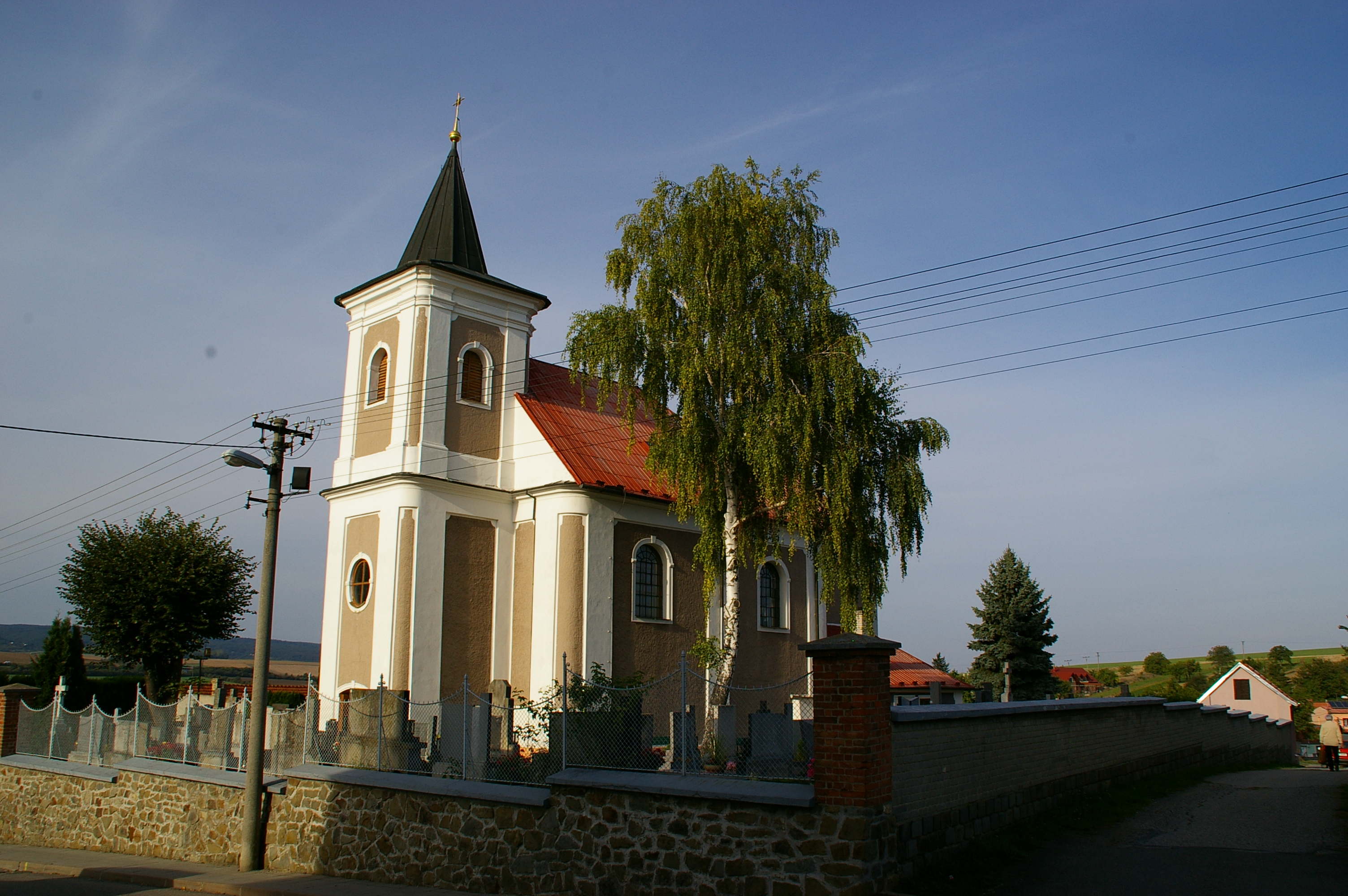 Kostel sv. Barbory (Velešovice), Velešovice